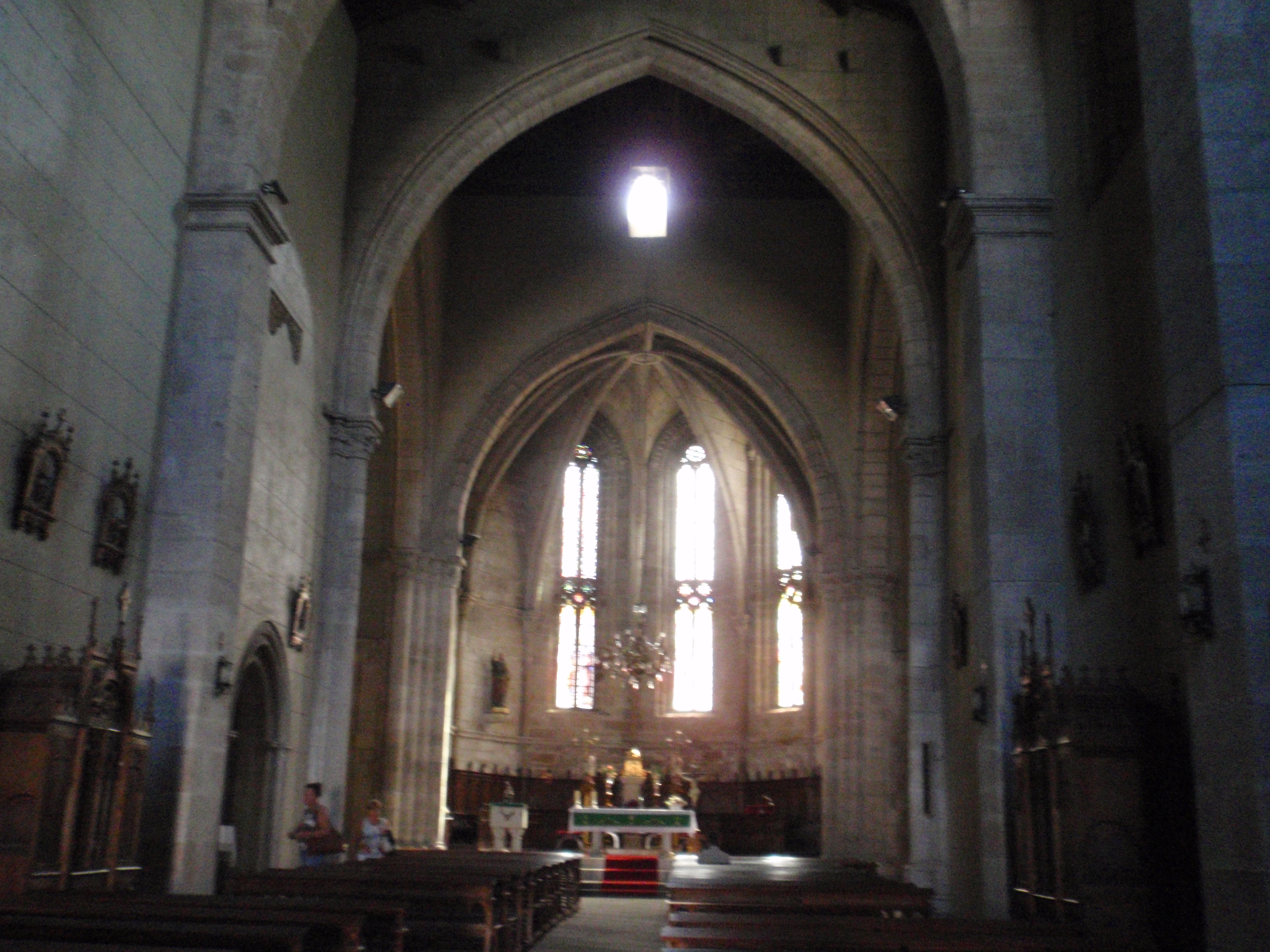 Antiguo Convento de San Francisco, hoy Parroquia de San Pedro (Lugo)